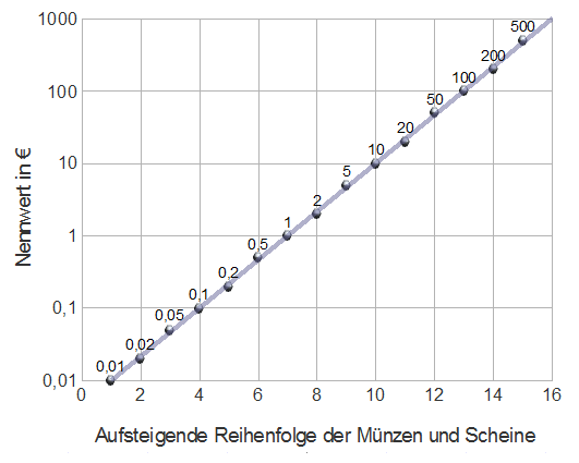 Exponentieller Anstieg des Nennwertes mit aufsteigender Reihenfolge der Münzen, Banknoten